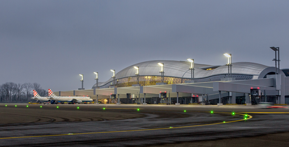 Novi terminal Međunarodne Zračne luke Zagreb